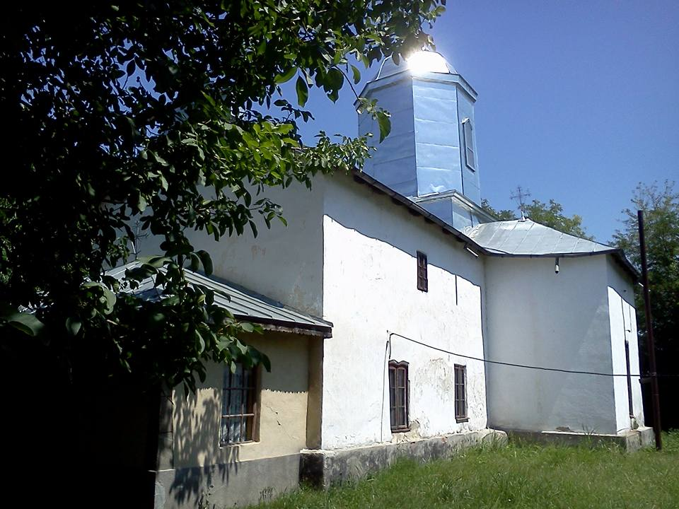 Biserica „Sf. Dumitru”- de Piatră